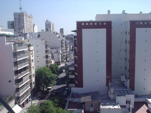 Barrio de Villa Crespo, Ciudad de Buenos Aires, Argentina.